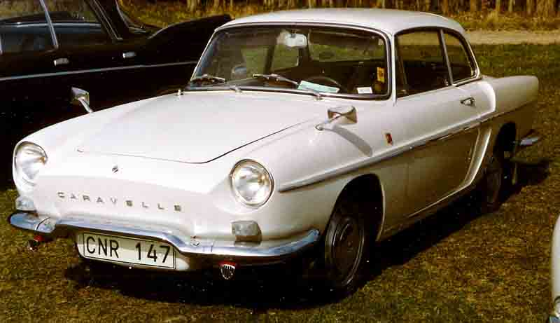 Renault R 1133 Caravelle 1968